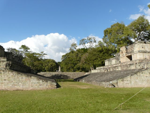 Vue du Guatemala.